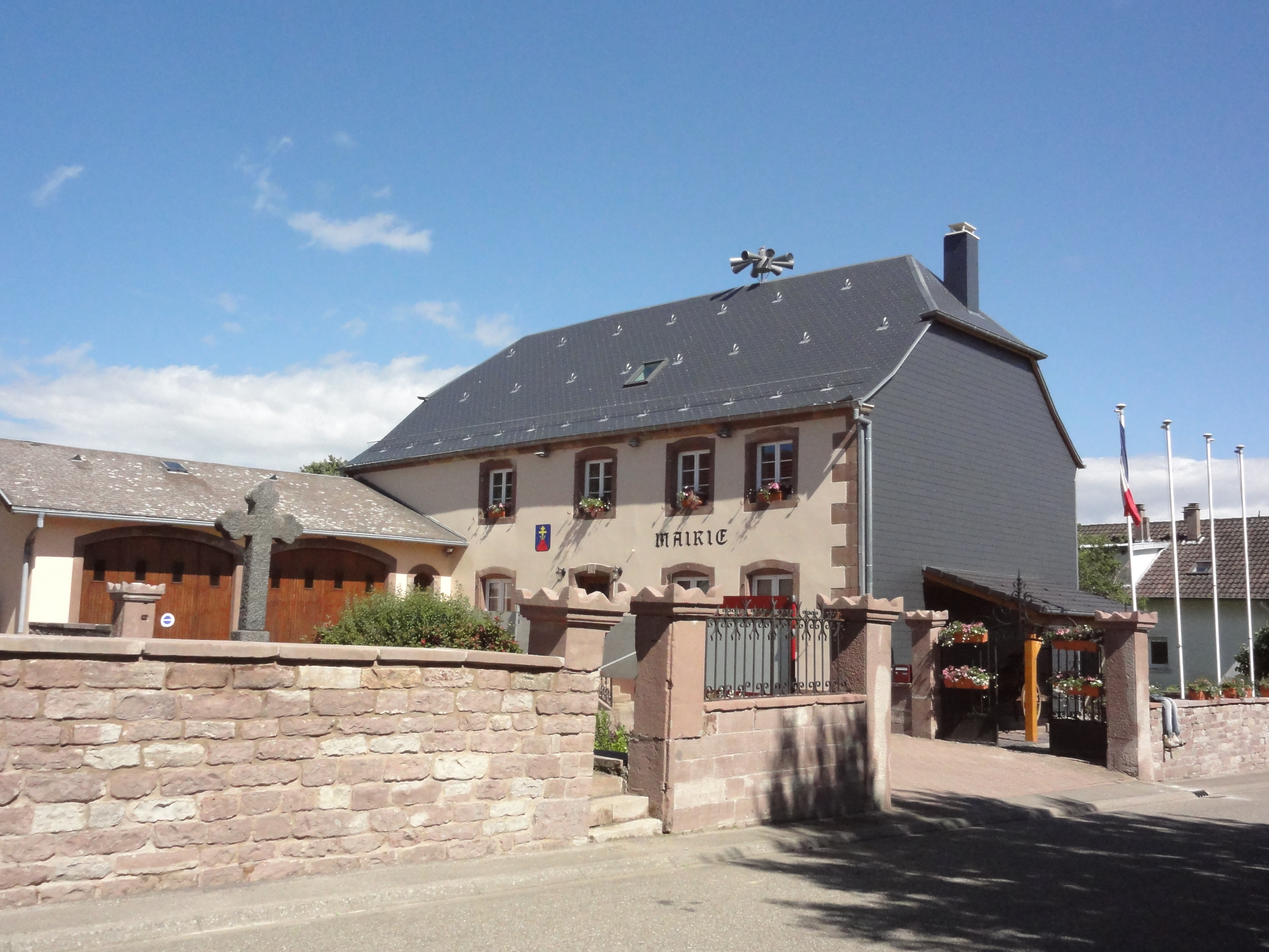 Henridorff (Moselle) mairie